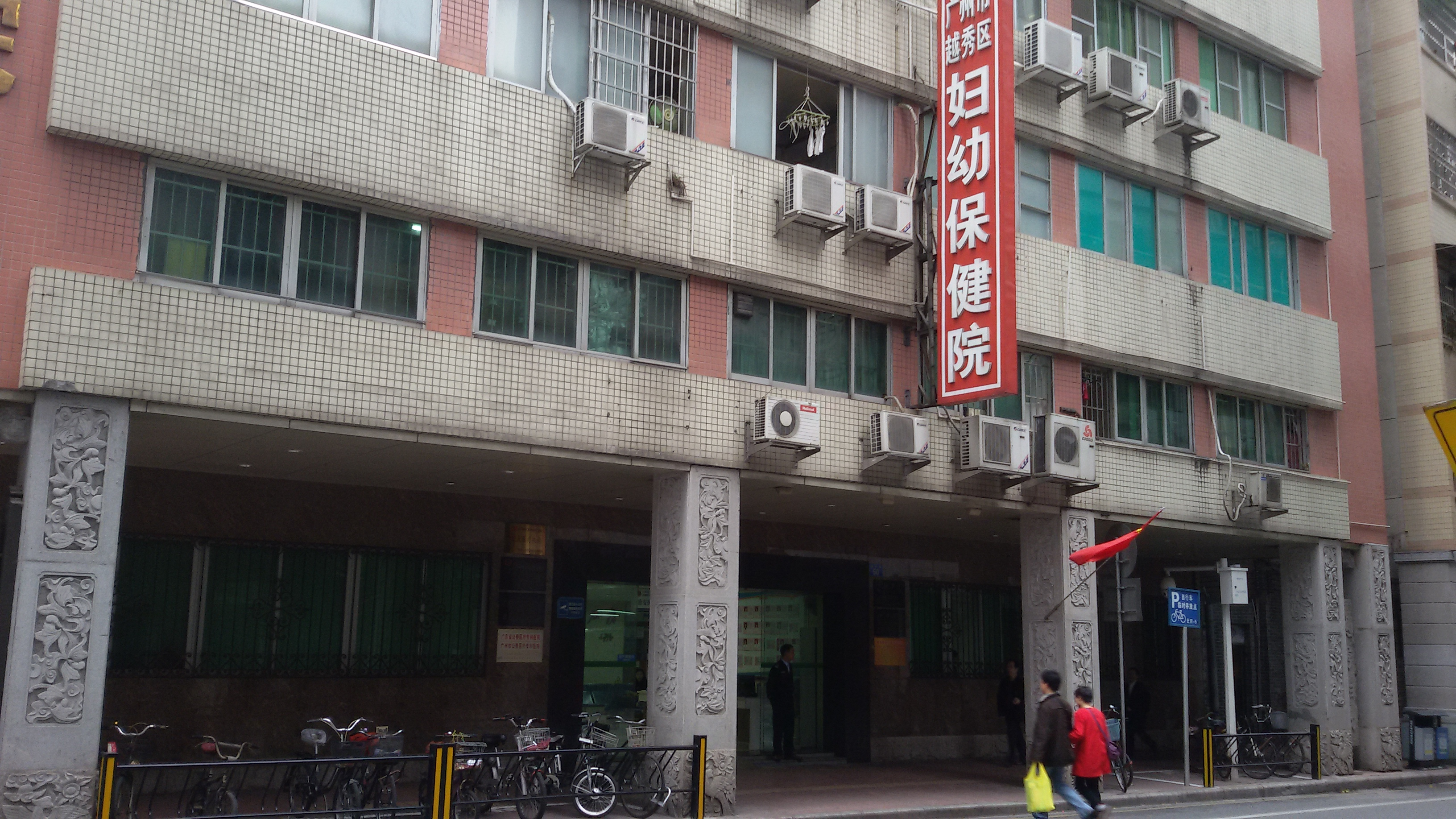 粵語: 广州市越秀区妇幼保健院